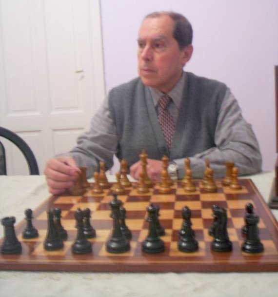 Raimundo García posa con su ajedrez cubano, que le fuera obsequiado en la Olimpiada de La Habana 1966, por Fidel Castro.